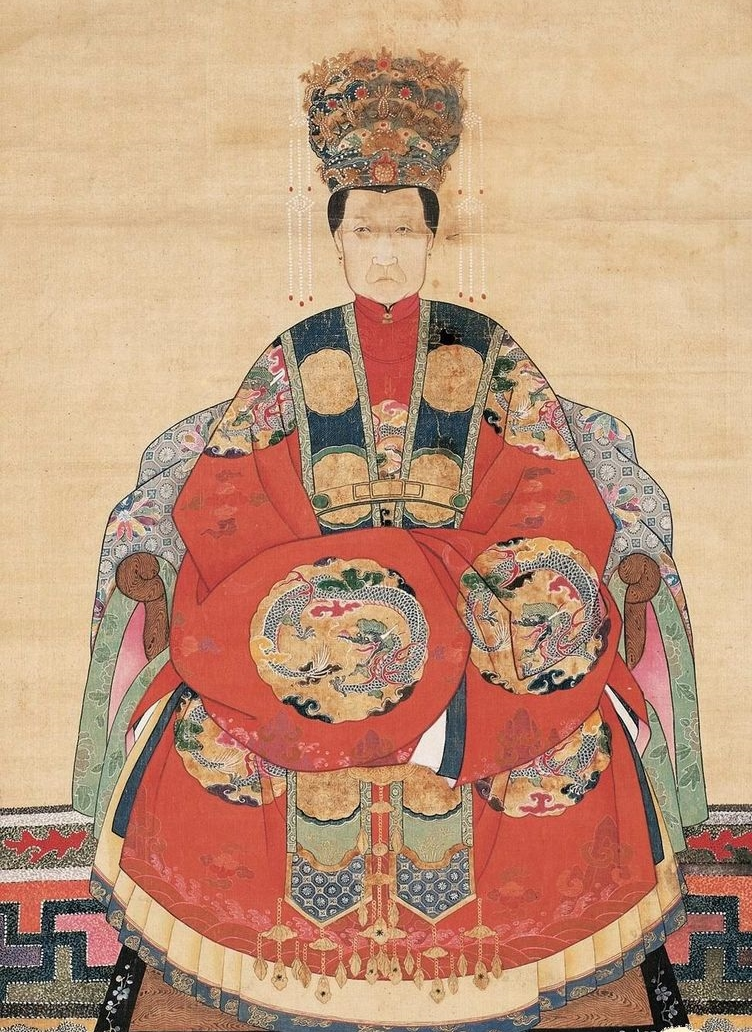 中文（香港）: 明代寫實容像